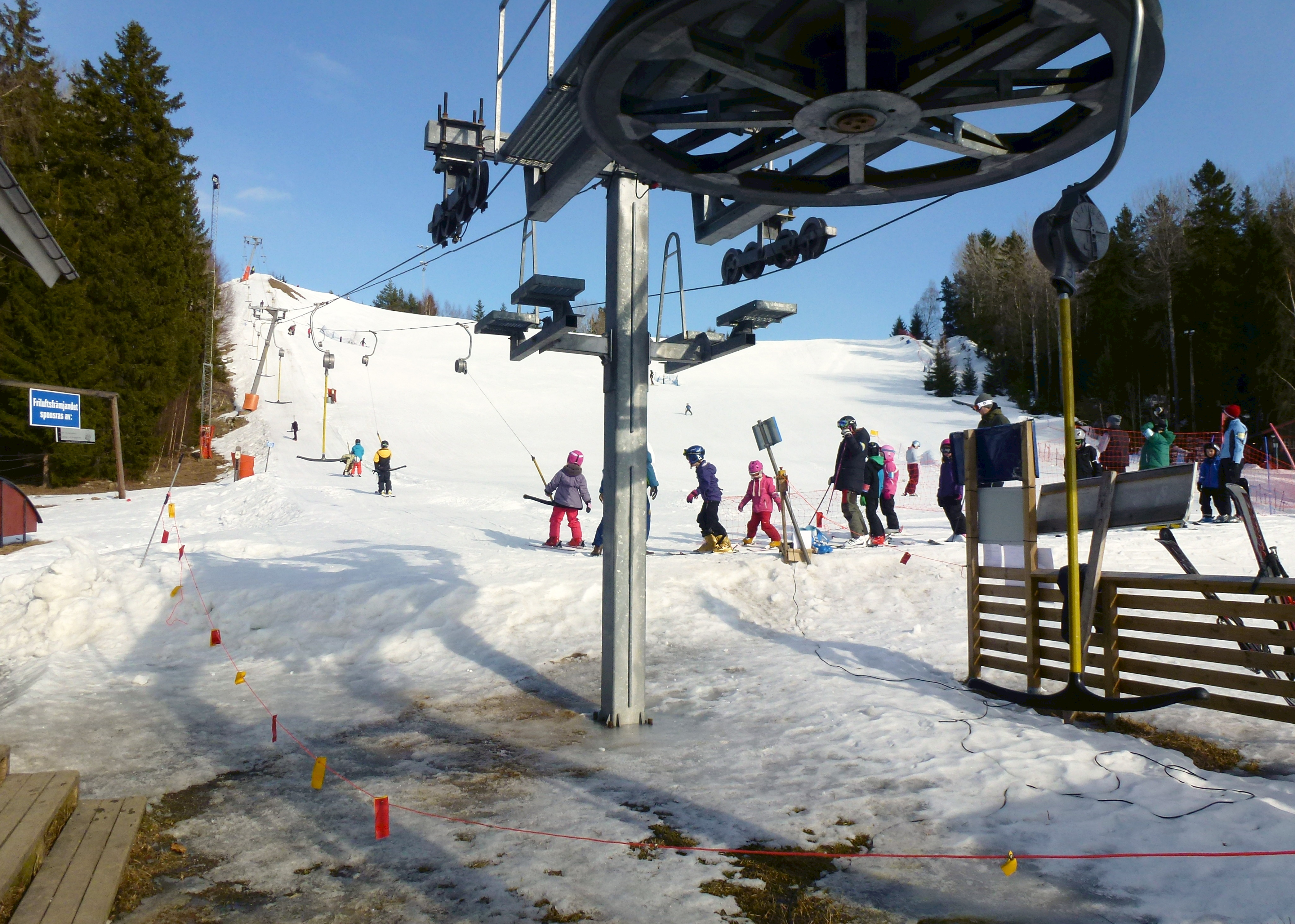 Ranghildsborgsbacken vid Ranghildsborgs gård